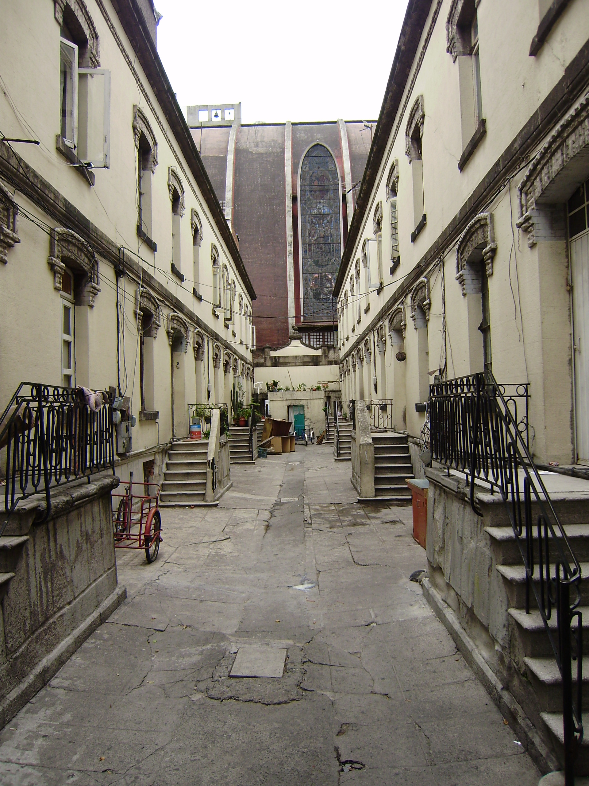 Patio de vecindad de la Colonia Roma, Ciudad de Mexico, calle Puebla.